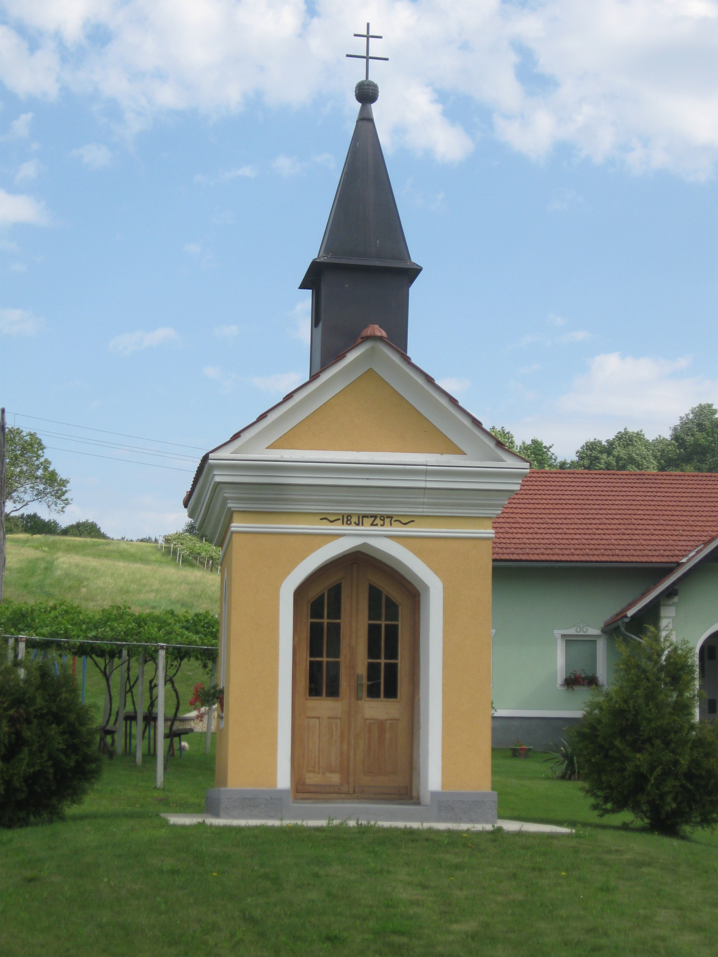 Kapela iz leta 1897 z zvonikom. V kapeli sta kipa Marije in sv. Ane. Kapela stoji blizu domačije Brengova št. 20.